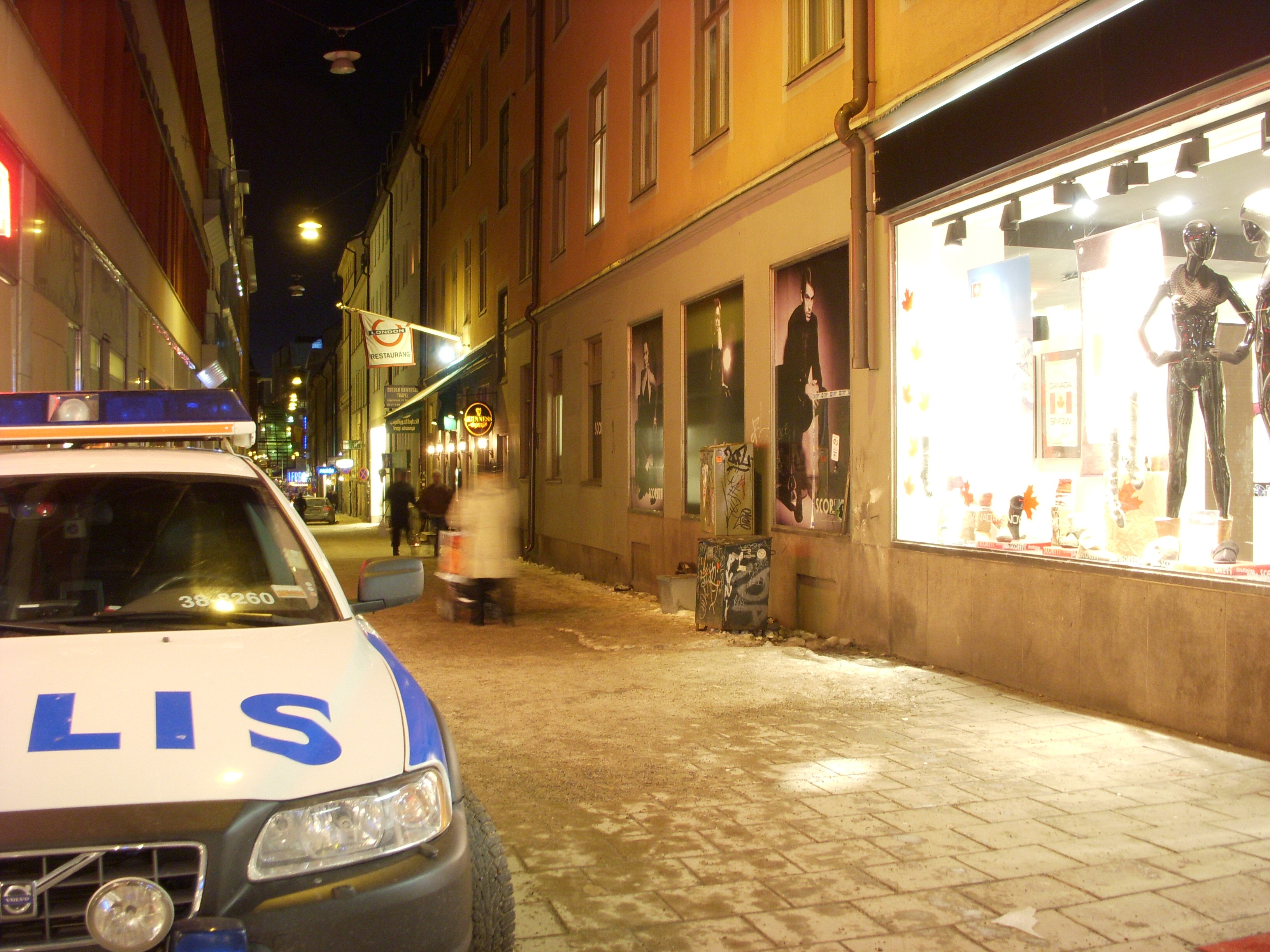 Bombsprängningen i Stockholm, platsen för sprängningen, skada på fasad, trasig skyltfönster och stuprör, 12 december 2010. Vy från Drottninggatan in mot Bryggargatan.